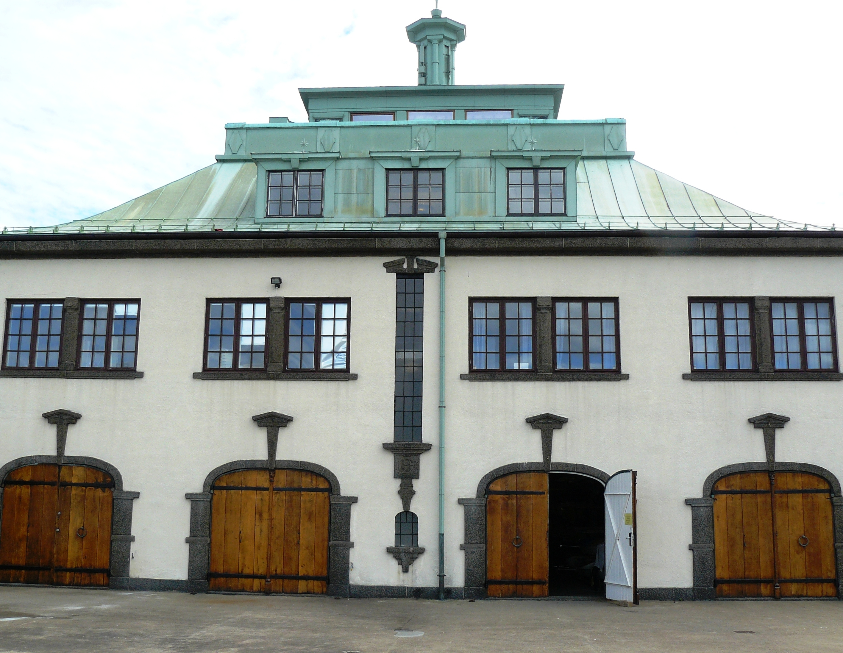 Kongen, building in Frogner, Oslo